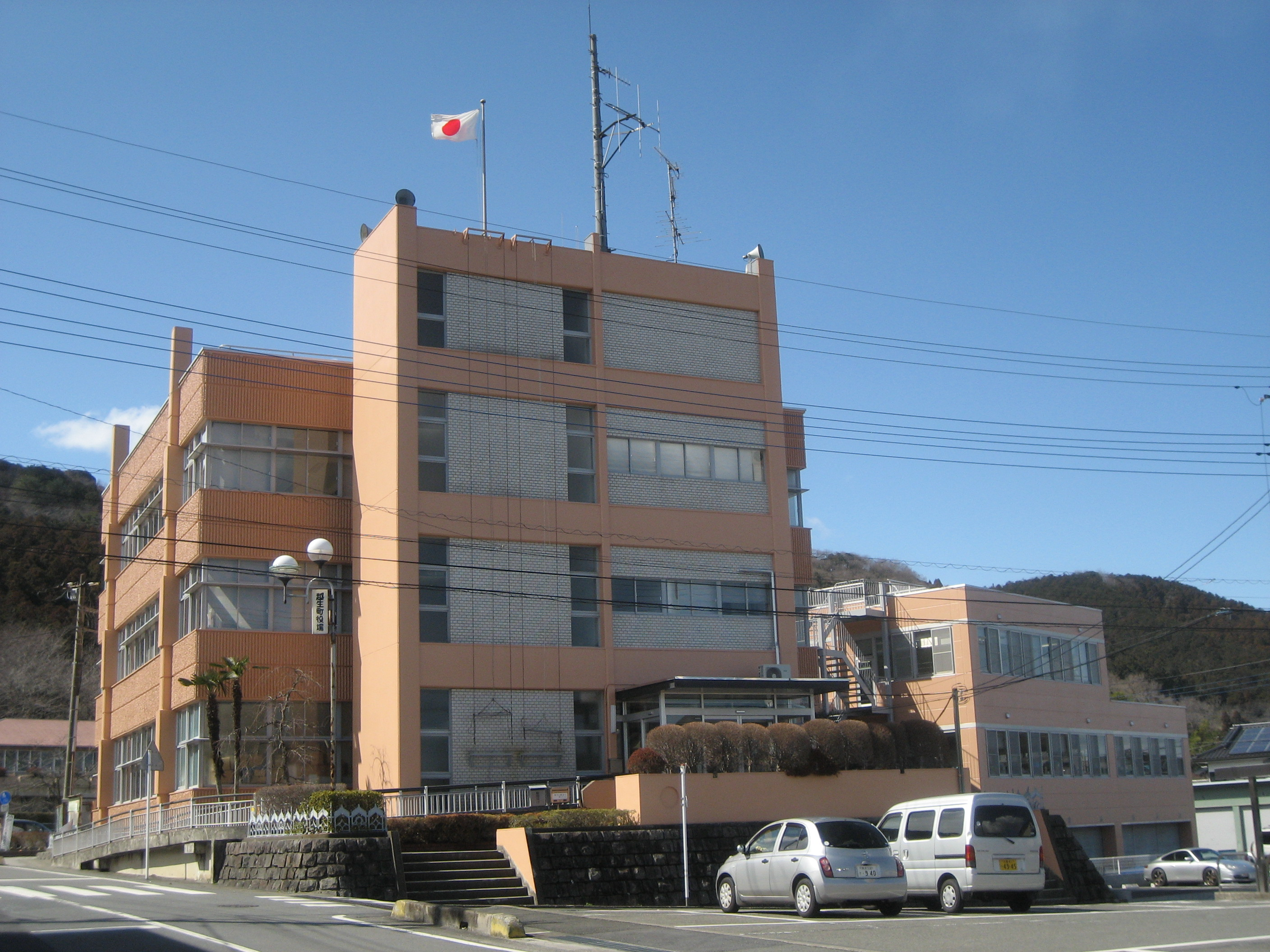 越生町役場庁舎